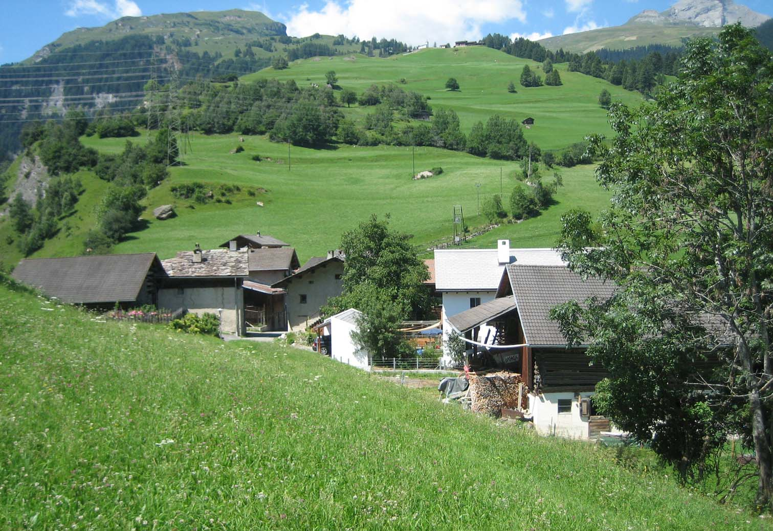 Casti GR